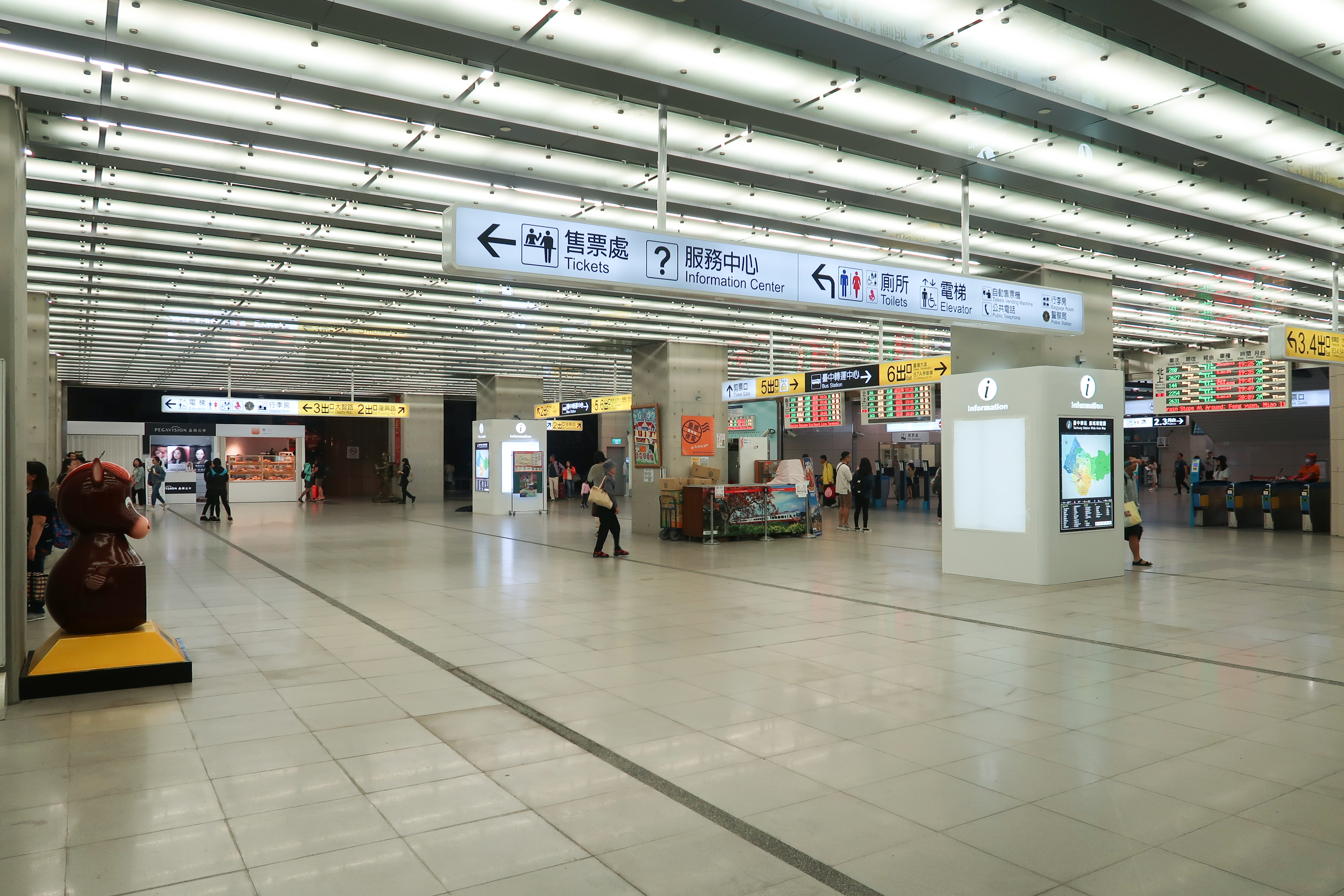 Taichung Station Station Hall